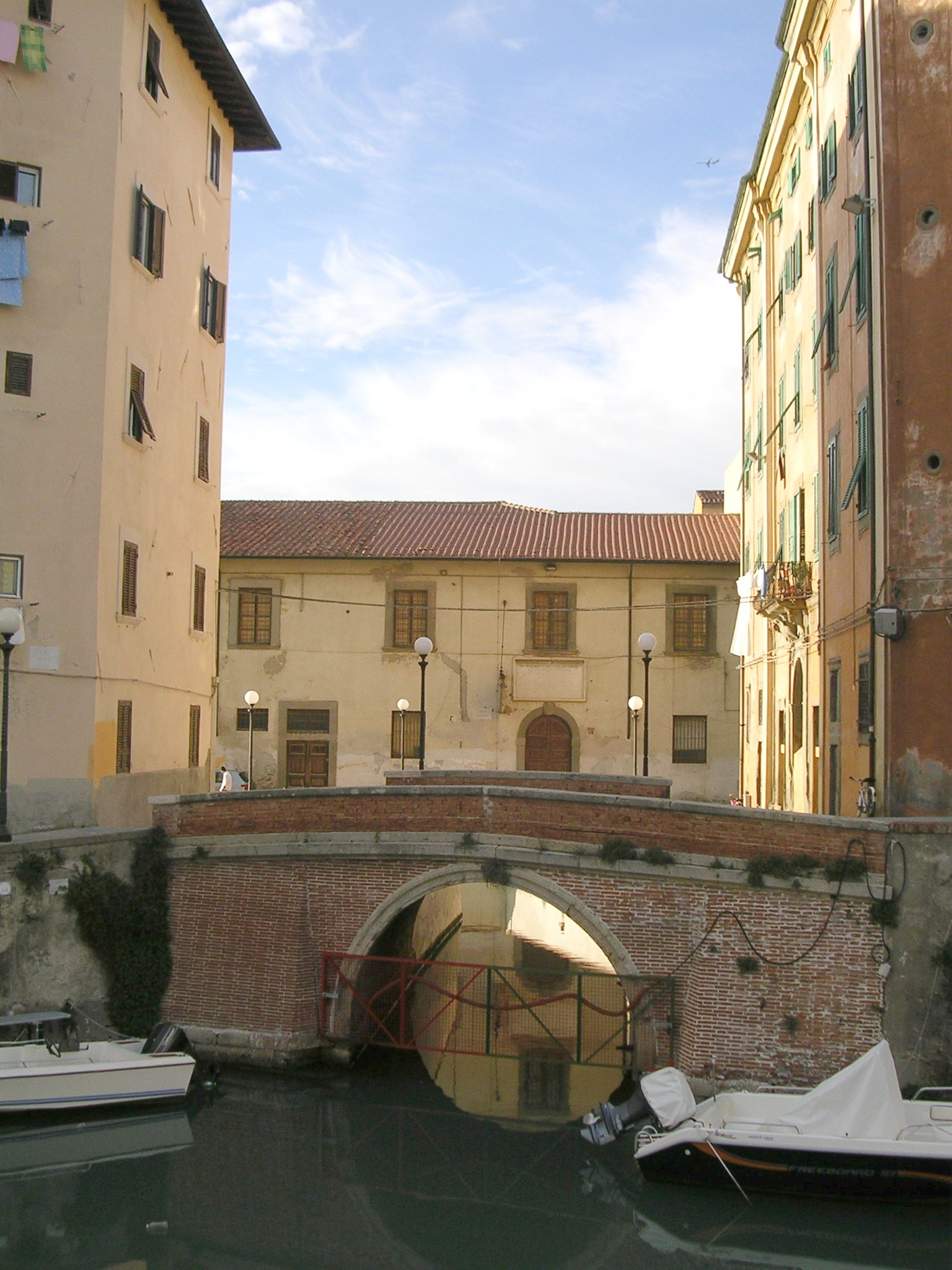 Livorno: i Bottini dell'olio (al centro della foto), nel quartiere della Venezia Nuova.